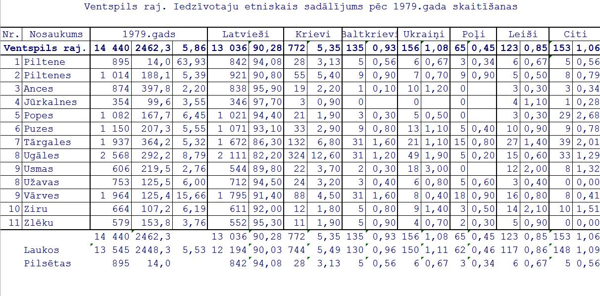 Latvijas 1979. gada tautas skaitīšanas dati